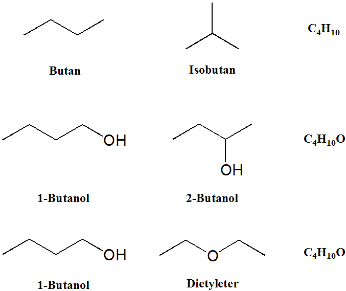 Struktur: Tor Svensson